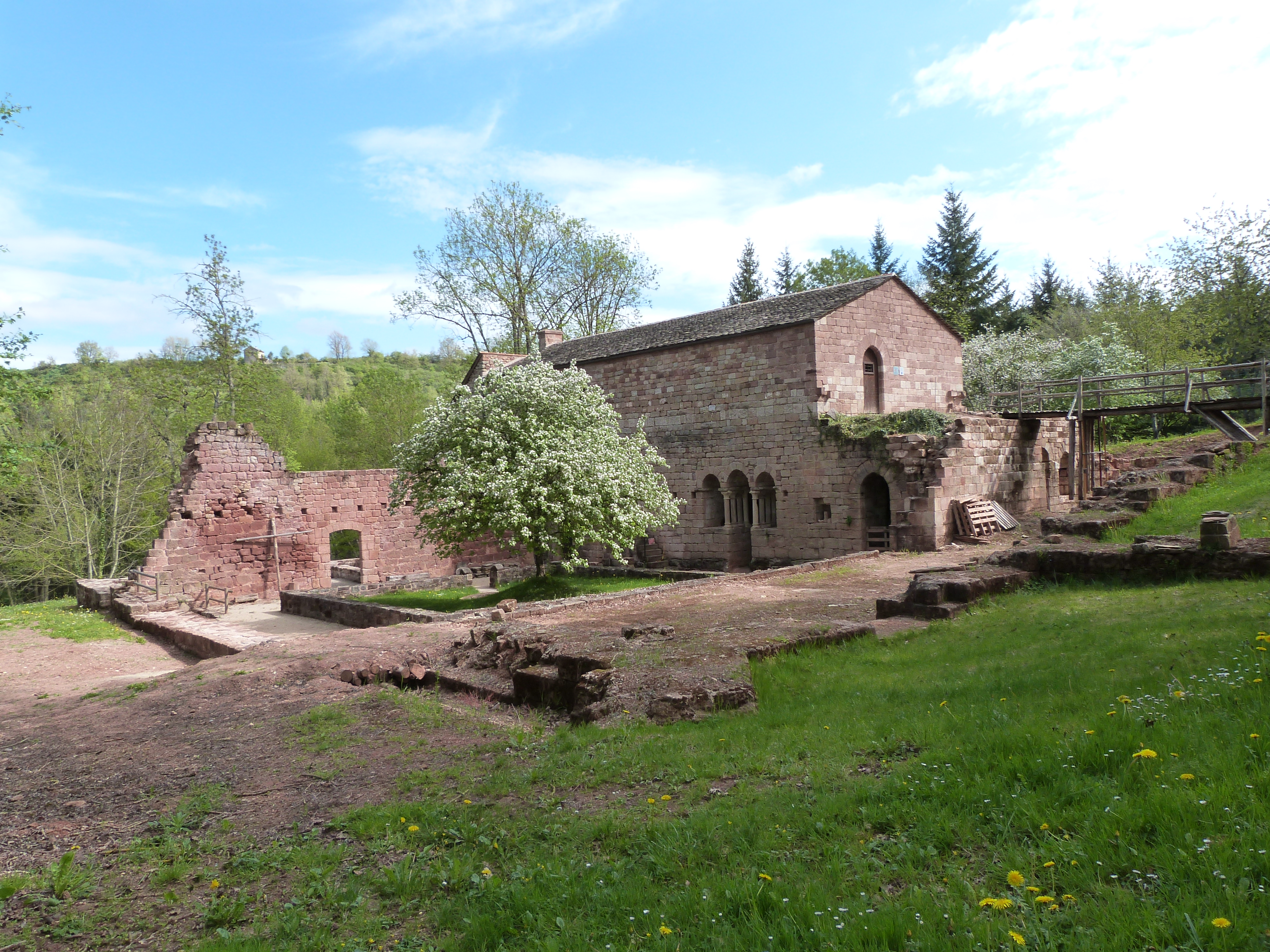 Prieuré du Sauvage